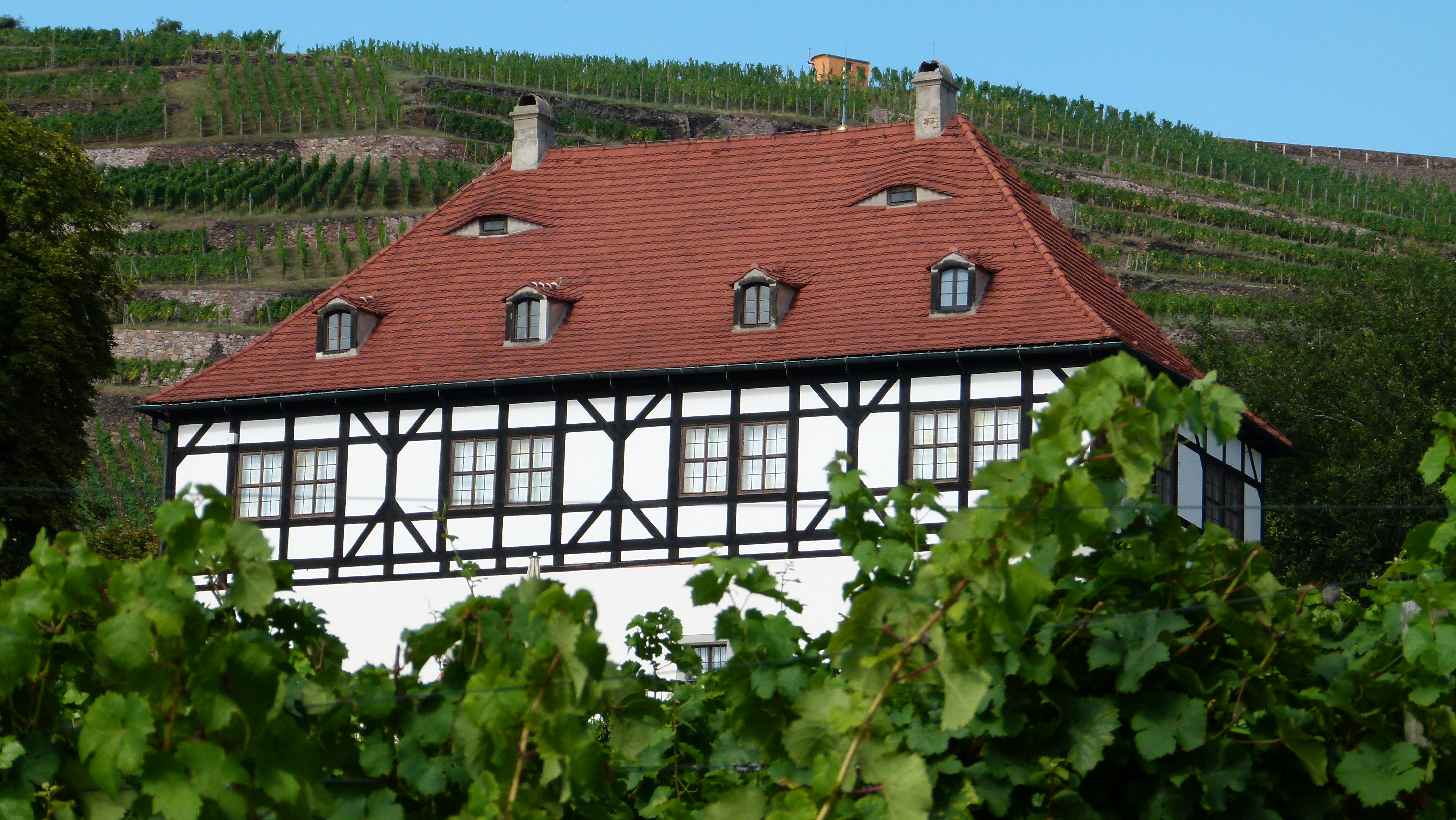 Berg- und Lusthaus Hoflößnitz, Radebeul, Sachsen